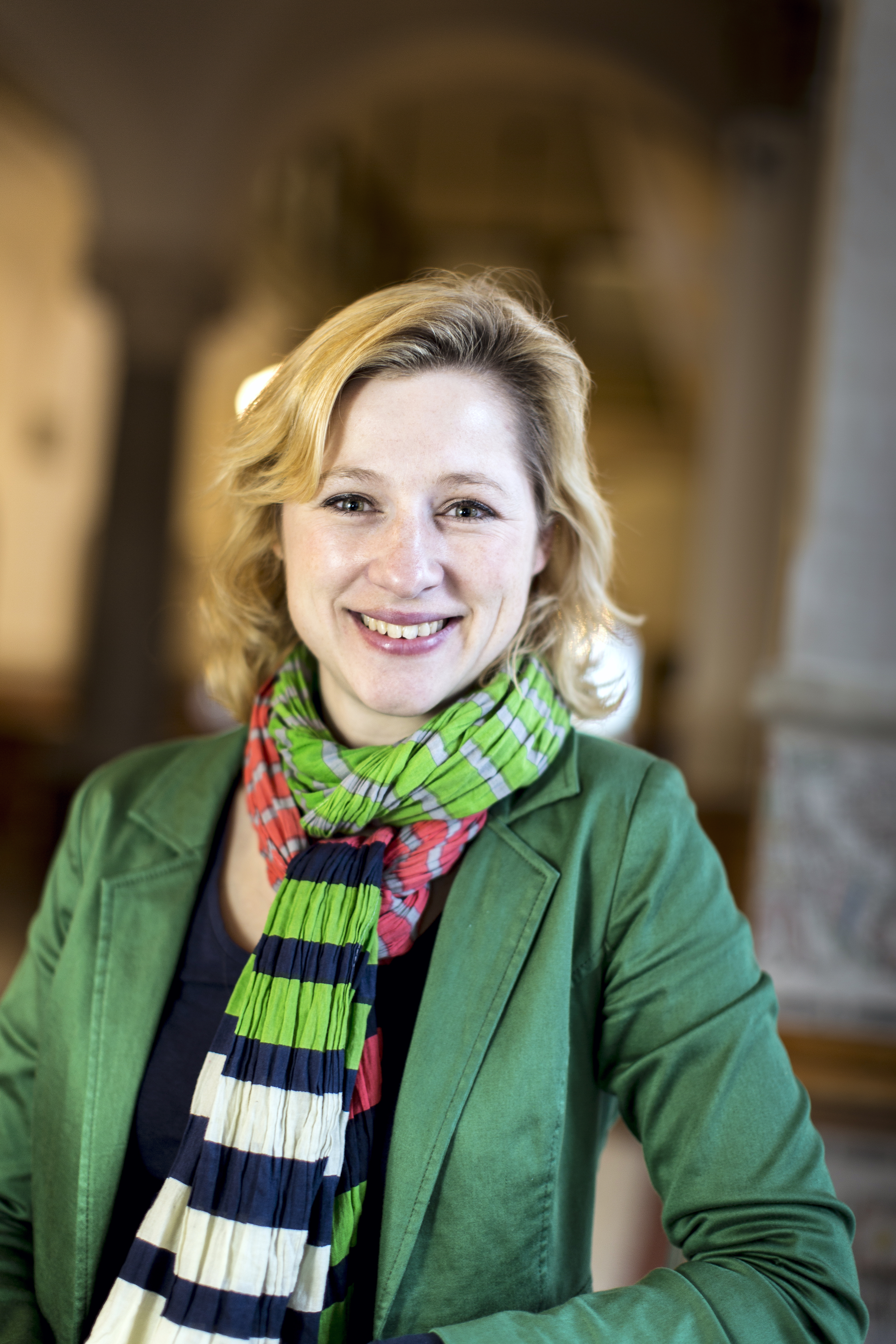 Sophie Hæstorp Andersen (S), ny regionrådsformand, Region Hovedstaden. Christiansborg den 4 december 2013.